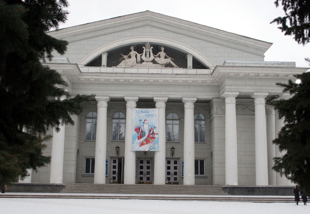 Саратовский театр Оперы и балета, 2006 год, 22 декабря